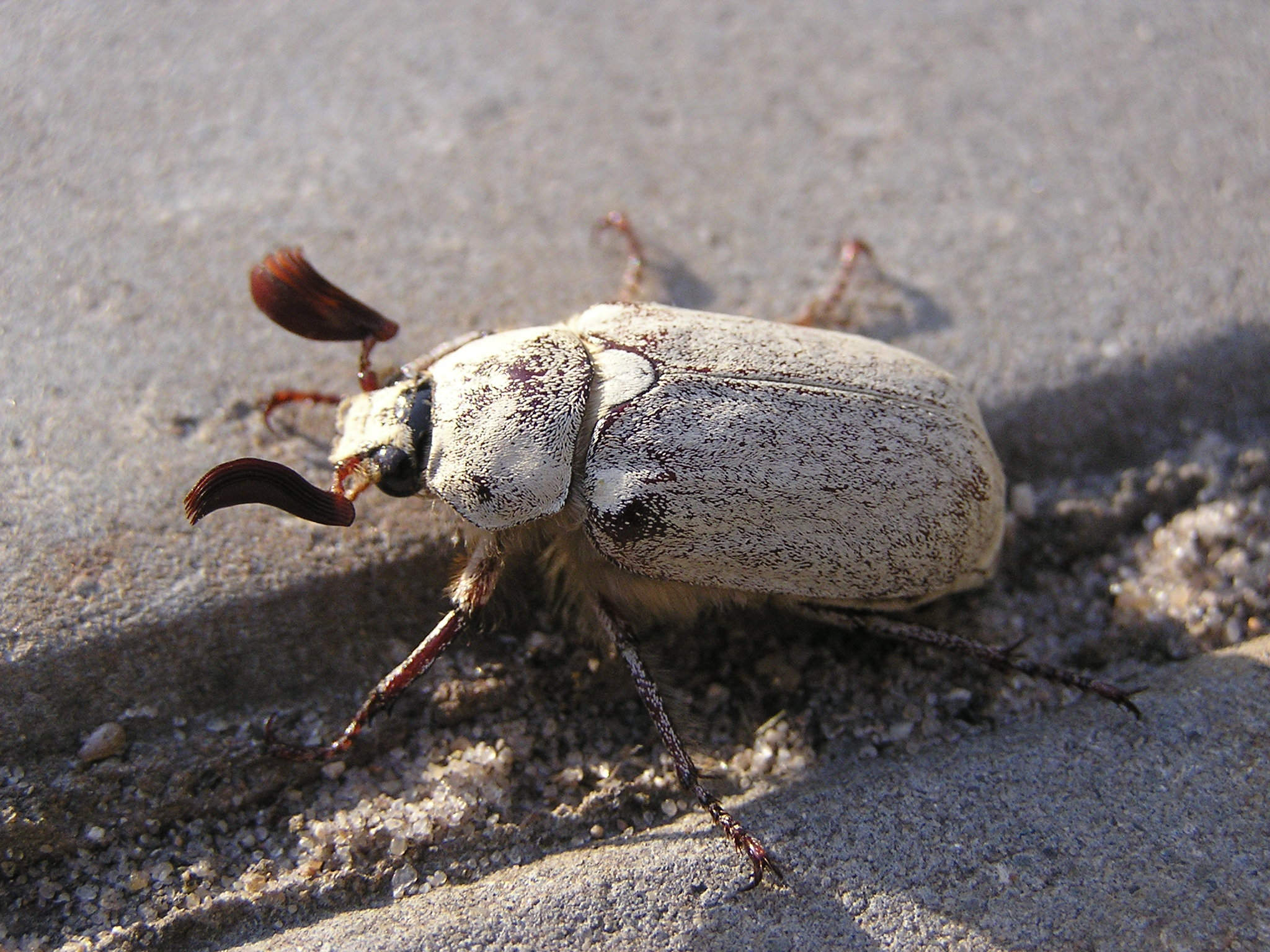 Насекомое